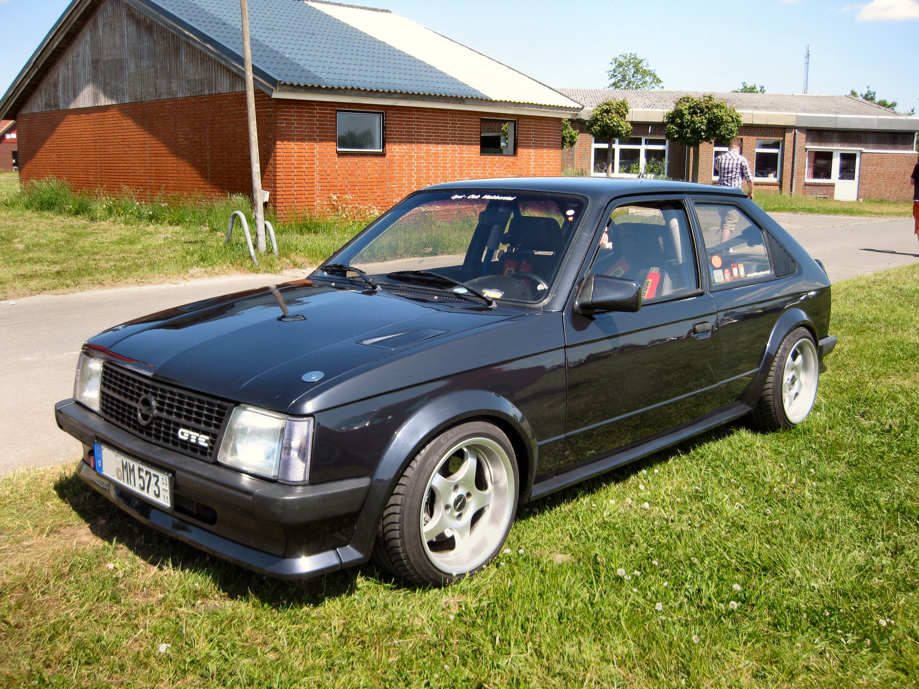 Opel Kadett E GT/E